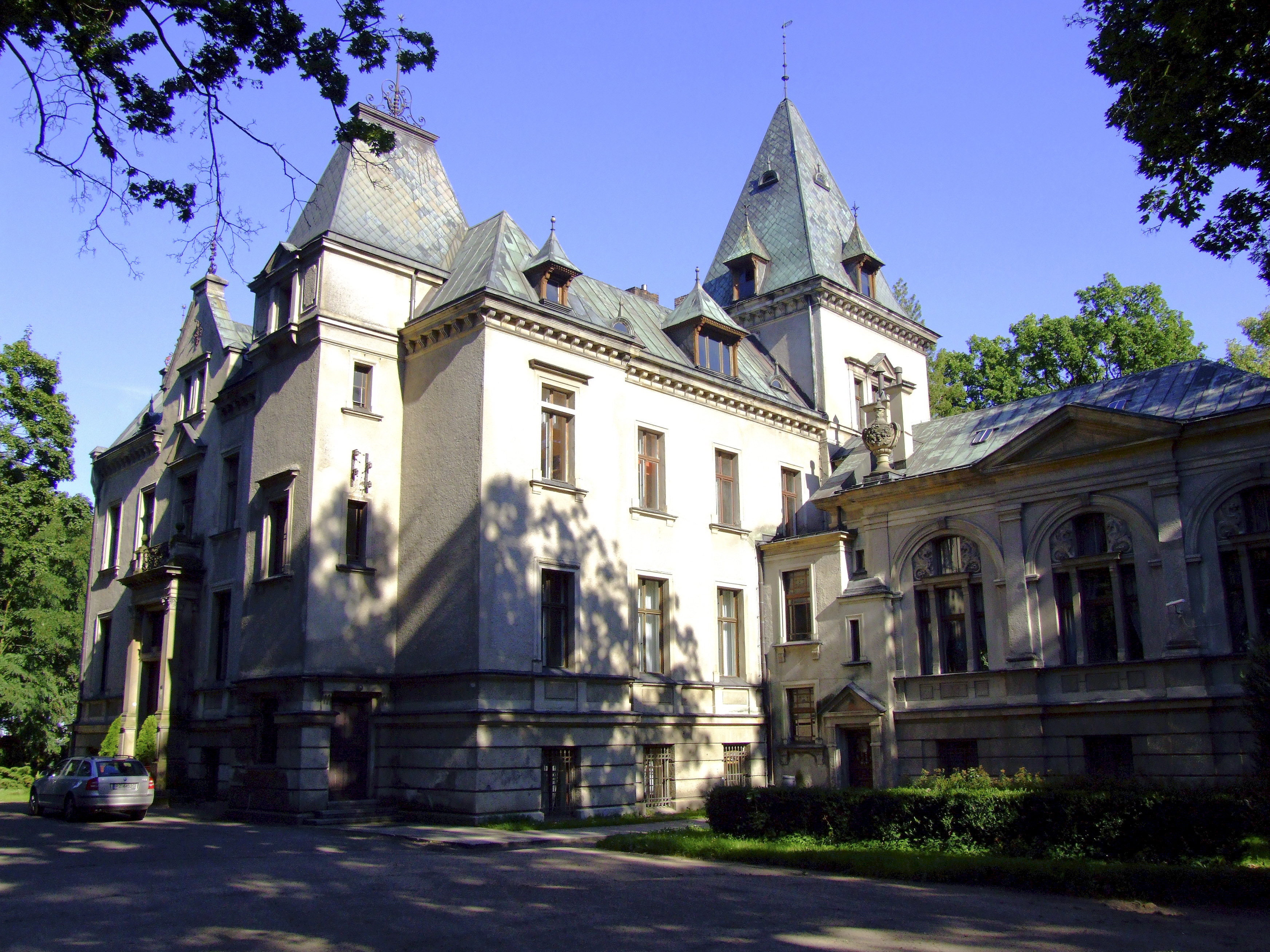 pałac z 1890 r., 1900 Brody, Lwówek